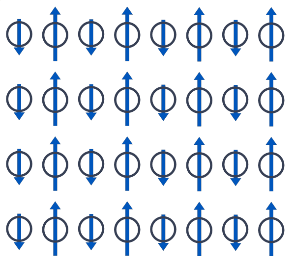 Esquema idealizado de una red ferrimagnética: los espines se ordenan y se oponen pero no se compensan. Esquema de ordenamiento ferrimagnético: las interacciones en cada linea son antiferromagnéticas, pero las columnas impares no compensan el momento magnético de las columnas pares.